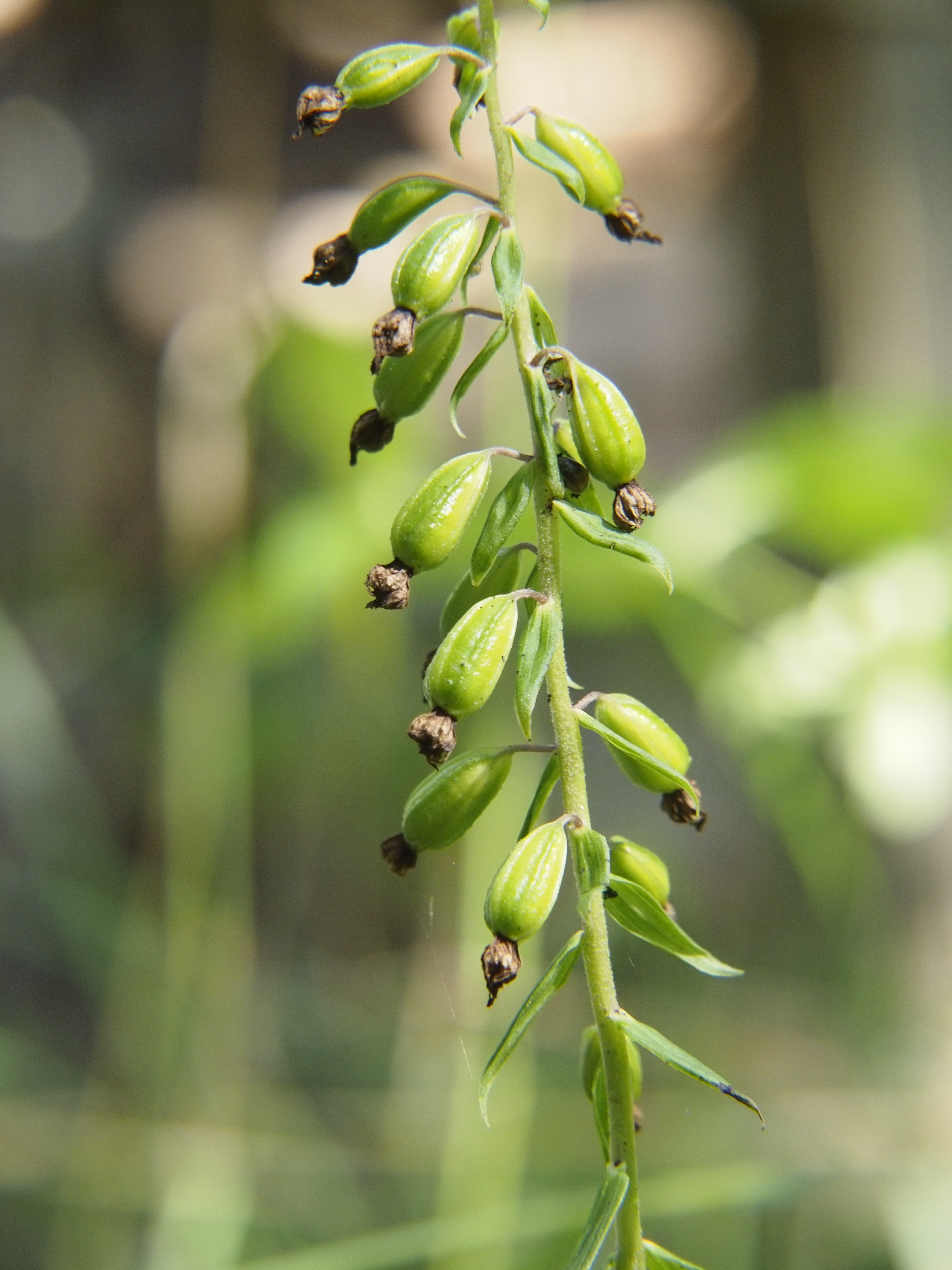 Frucht der Breitblättrigen Stendelwurz - Südheide, Germany